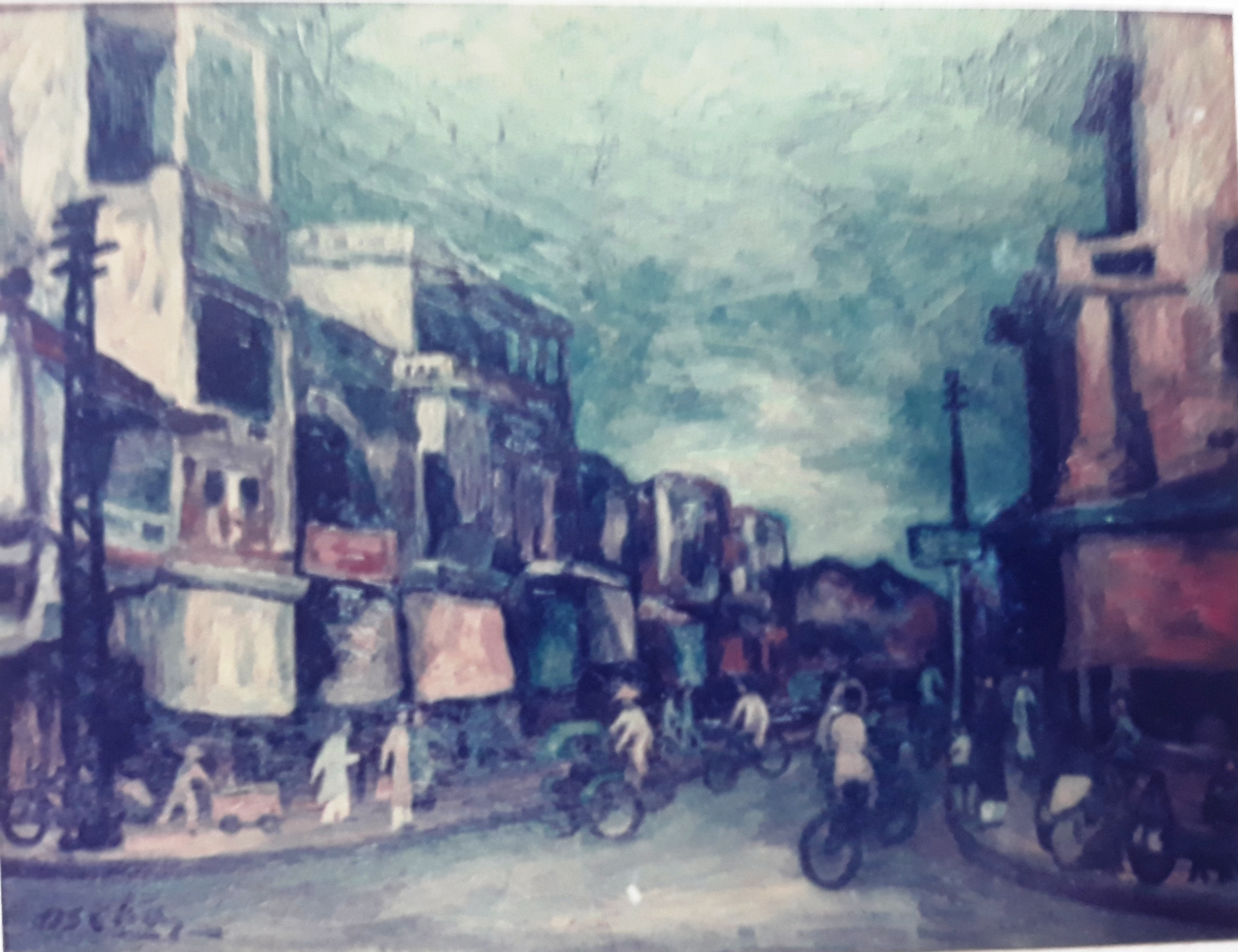 rue Hàng Đào